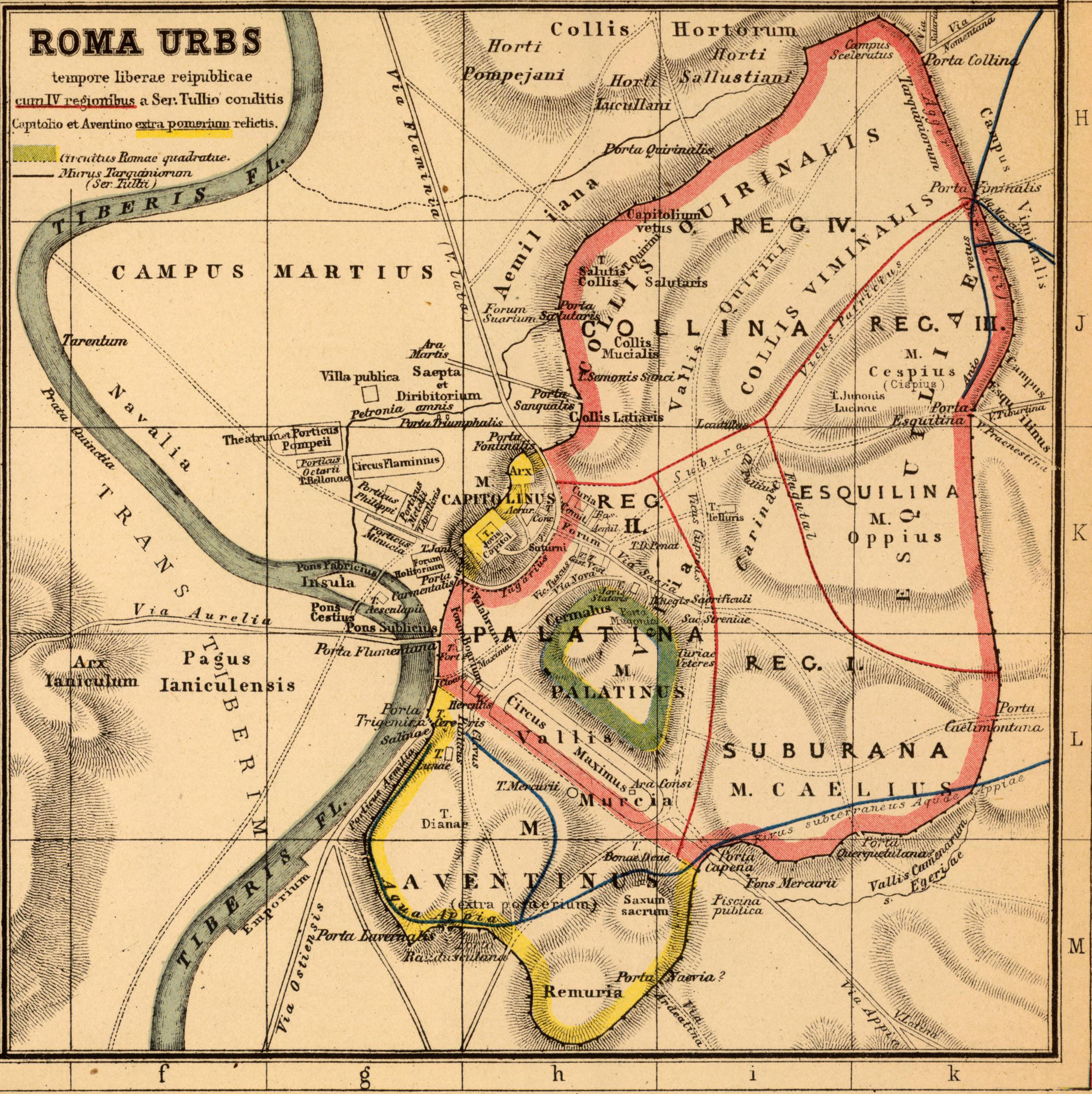 Roma urbs tempore liberae reipublicae cum IV regionibus a Ser. Tullio conditis Capitolio et Aventino extra pomerium relictis.